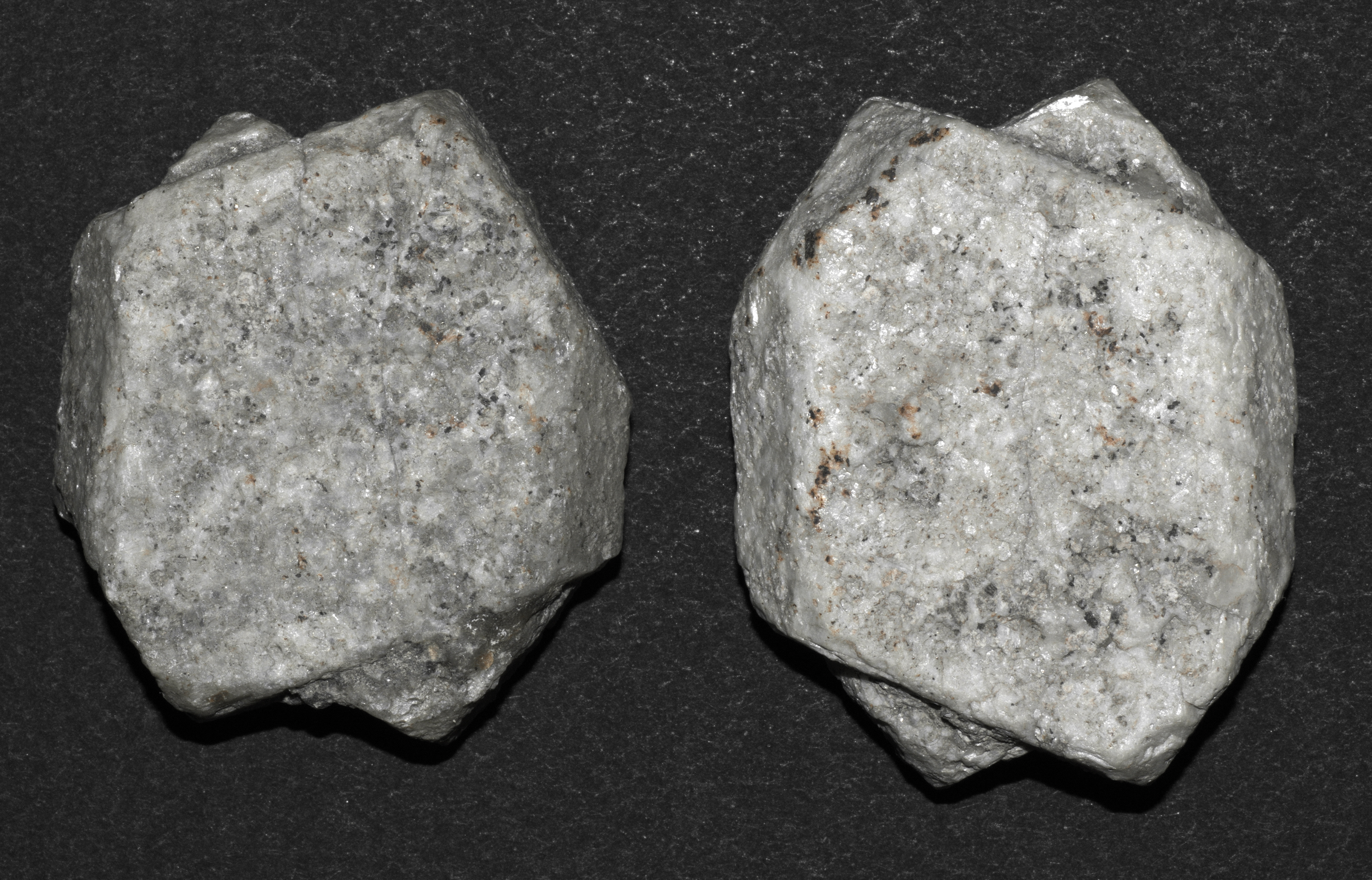 Karlovarská dvojčata – levé a pravé (srostlice krystalů živce - ortoklasu) z obce Hory u Karlových Varů, okres Karlovy Vary